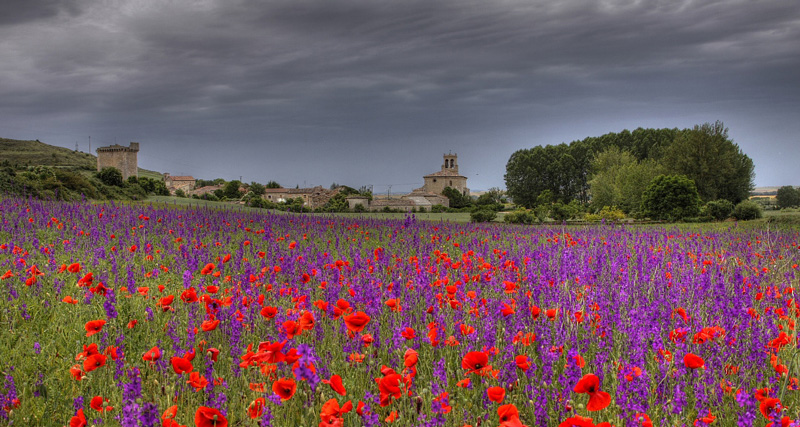 Panoramica de Olmos de la Picaza en primavera